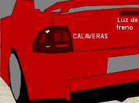 Descripción gráfica del arreglo de luces en la calavera de un auto moderno